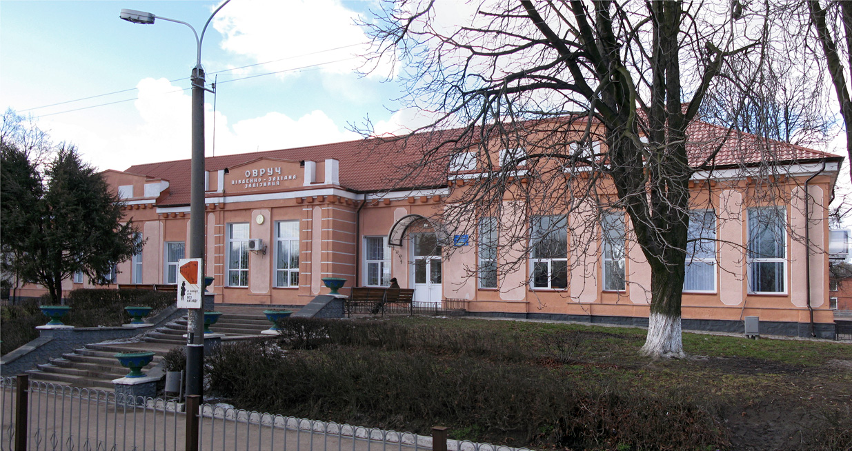 Вокзал станції Овруч